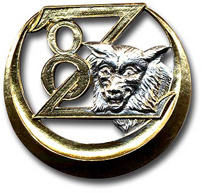 Blason du 2ème Régiment de Marche de Zouaves (b)